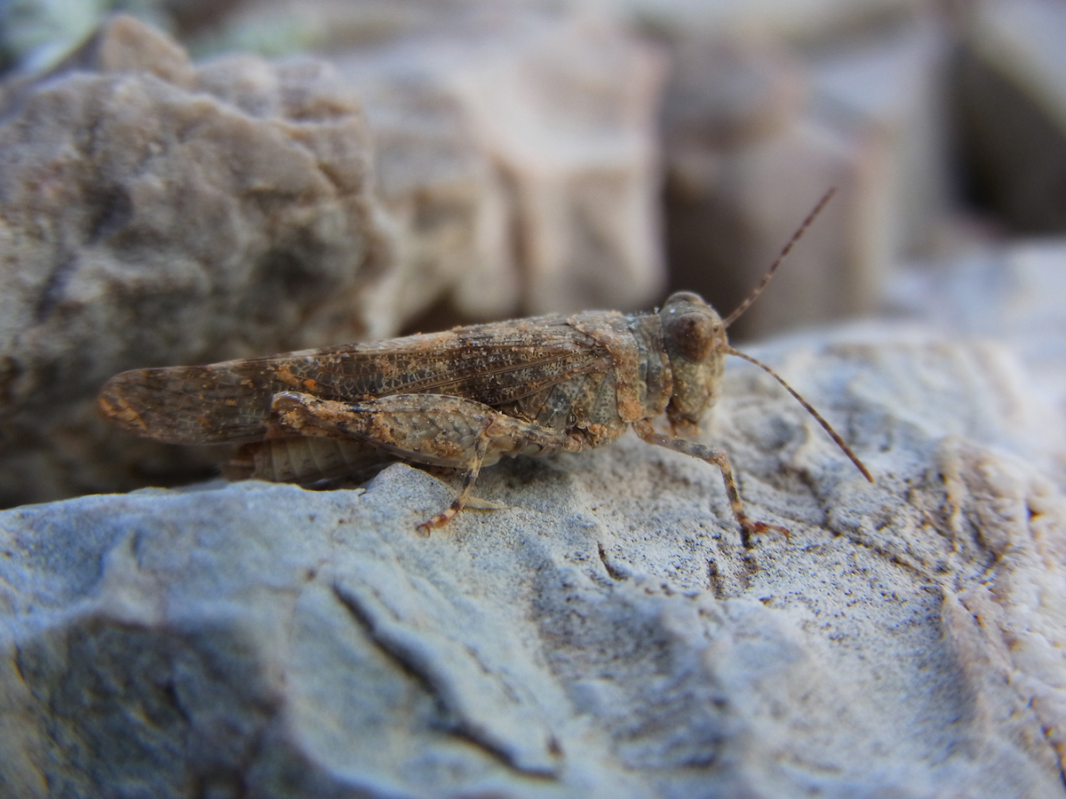 Unbestimmte Kurzfühlerschrecke, Menorca